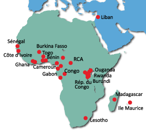 Implantation des Foyers de Charité en Afrique